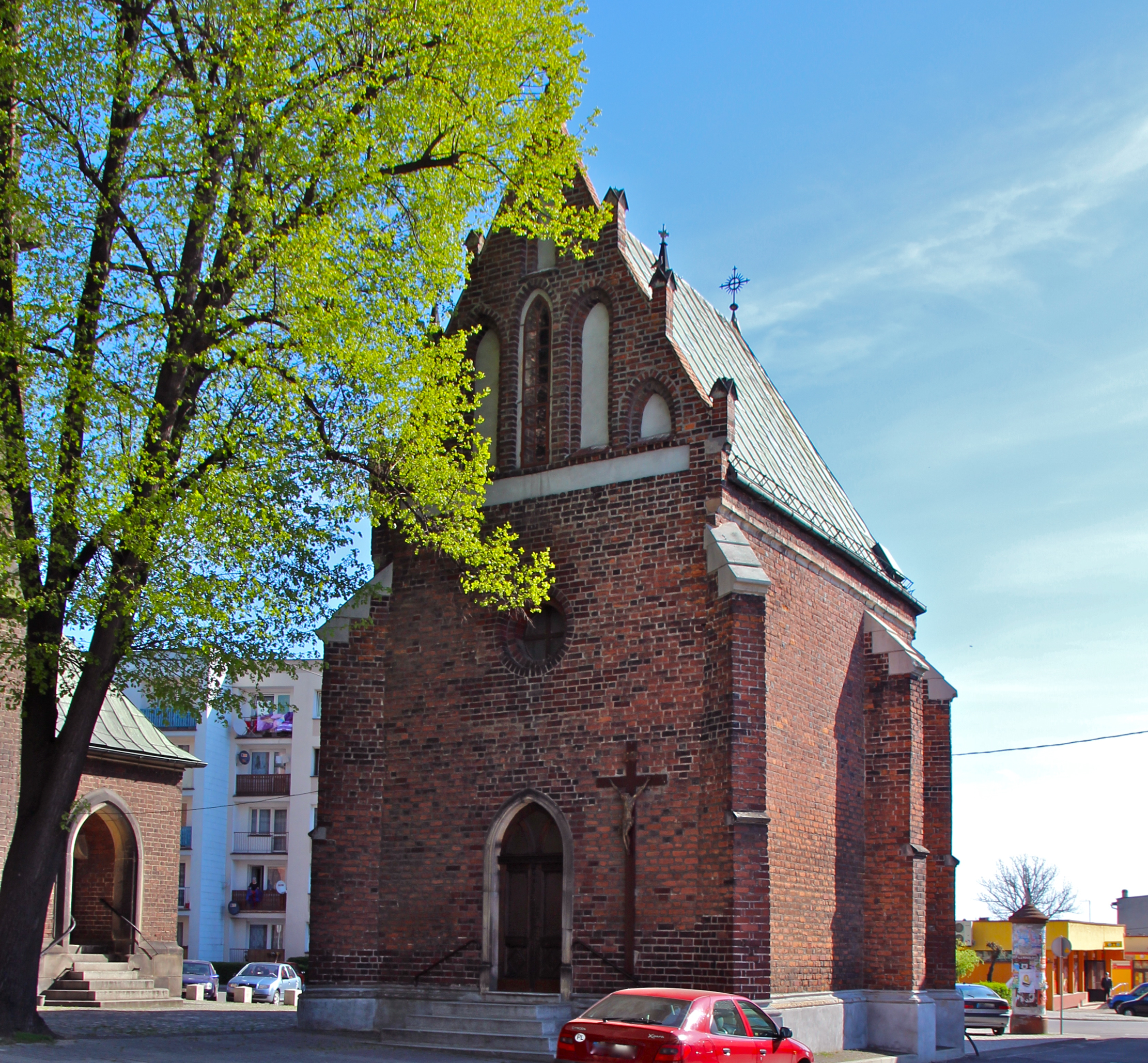 Głubczyce - miasto w Polsce położona w województwie opolskim, w powiecie głubczyckim.